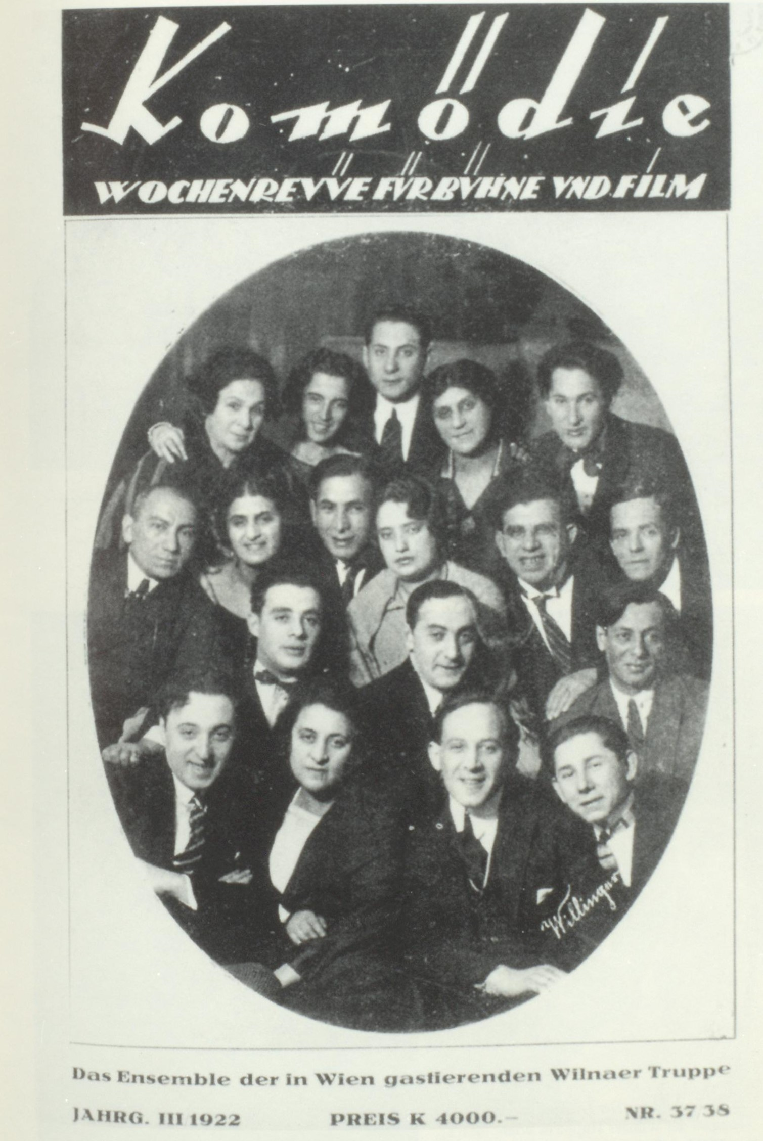 Wilhelm Willinger Wilnaer Truppe Wien 1922